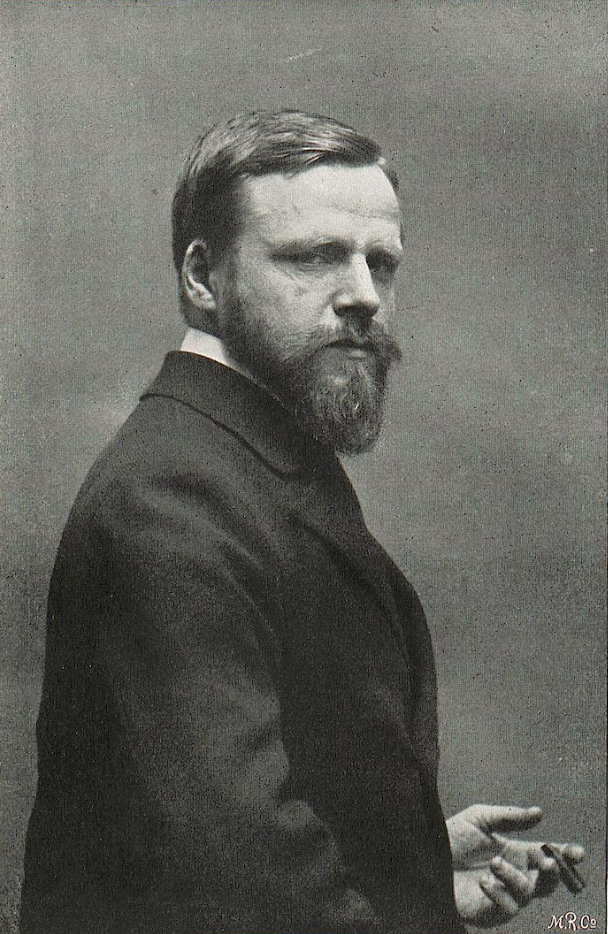 Portrait des Malers Heinz Heim, 1894 (abgedruckt in Deutsche Kunst und Dekoration, 1900)